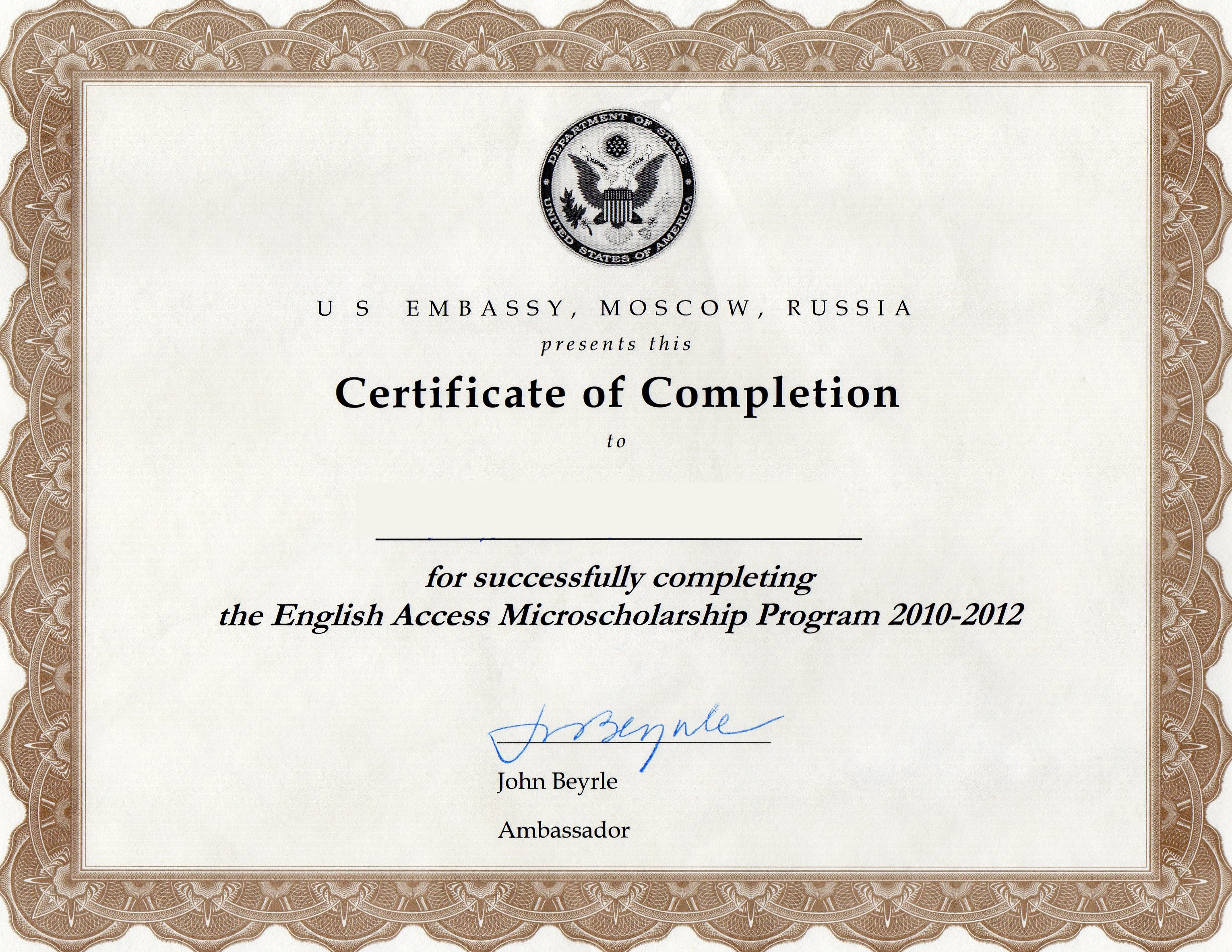 Сертификат завершения участия в программе English Access Microscholarship Program.